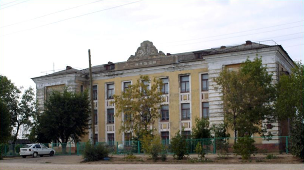 Приморская средняя школа. Посёлок Приморск Быковского района Волгоградской области, Россия.sochprimorskay.ucoz.ru